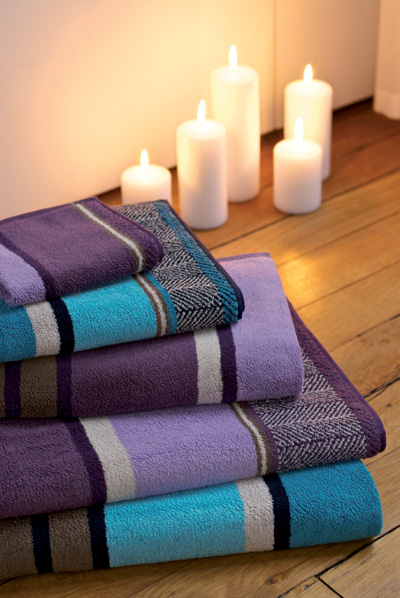 Collection Féria